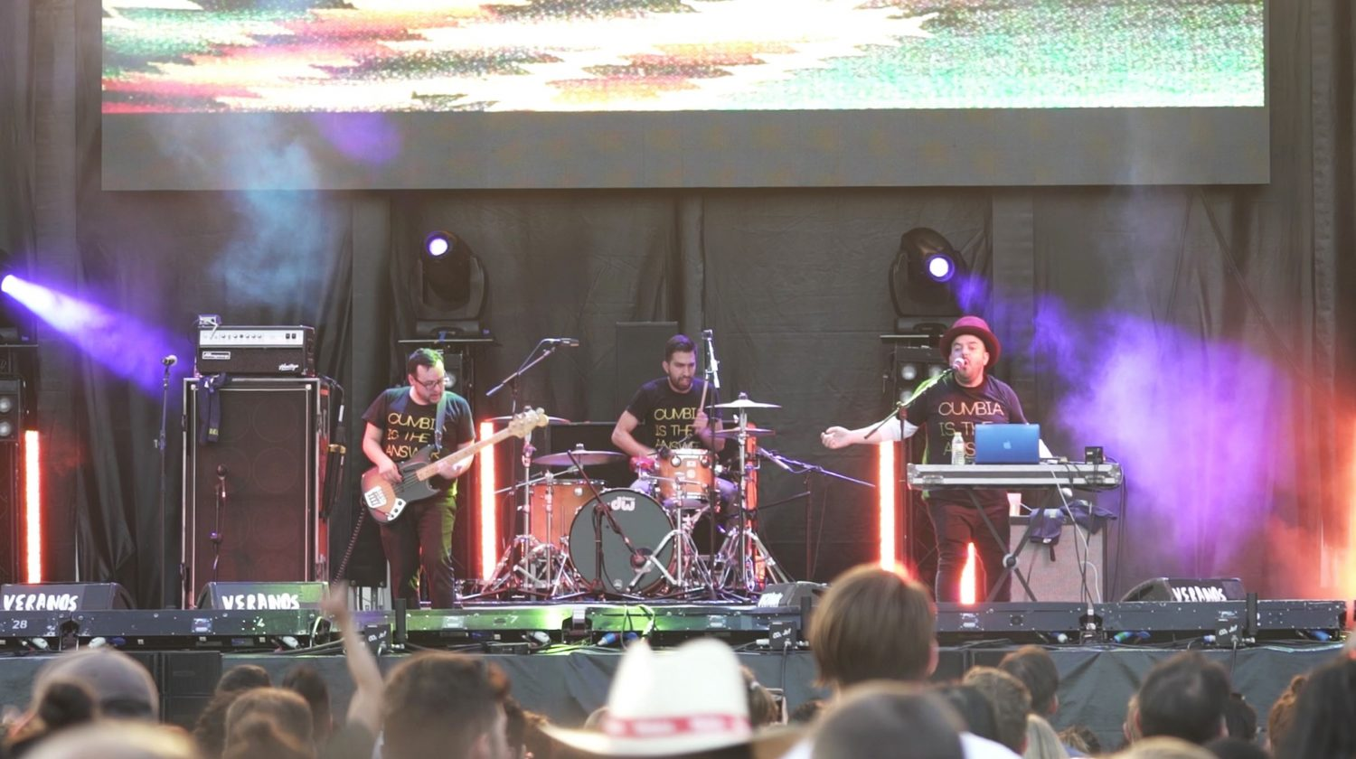 Veranos de la Villa 2017 se desplegó ayer por diferentes puntos de Madrid. Lo hizo con circo y con el sonido más contemporáneo de la música mexicana como guiño a la presencia de Madrid como ciudad invitada a la próxima Feria del Libro de Guadalajara (México).